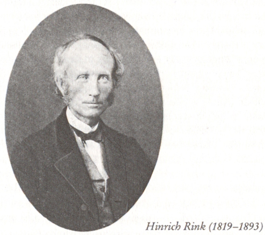 Hinrich Rink